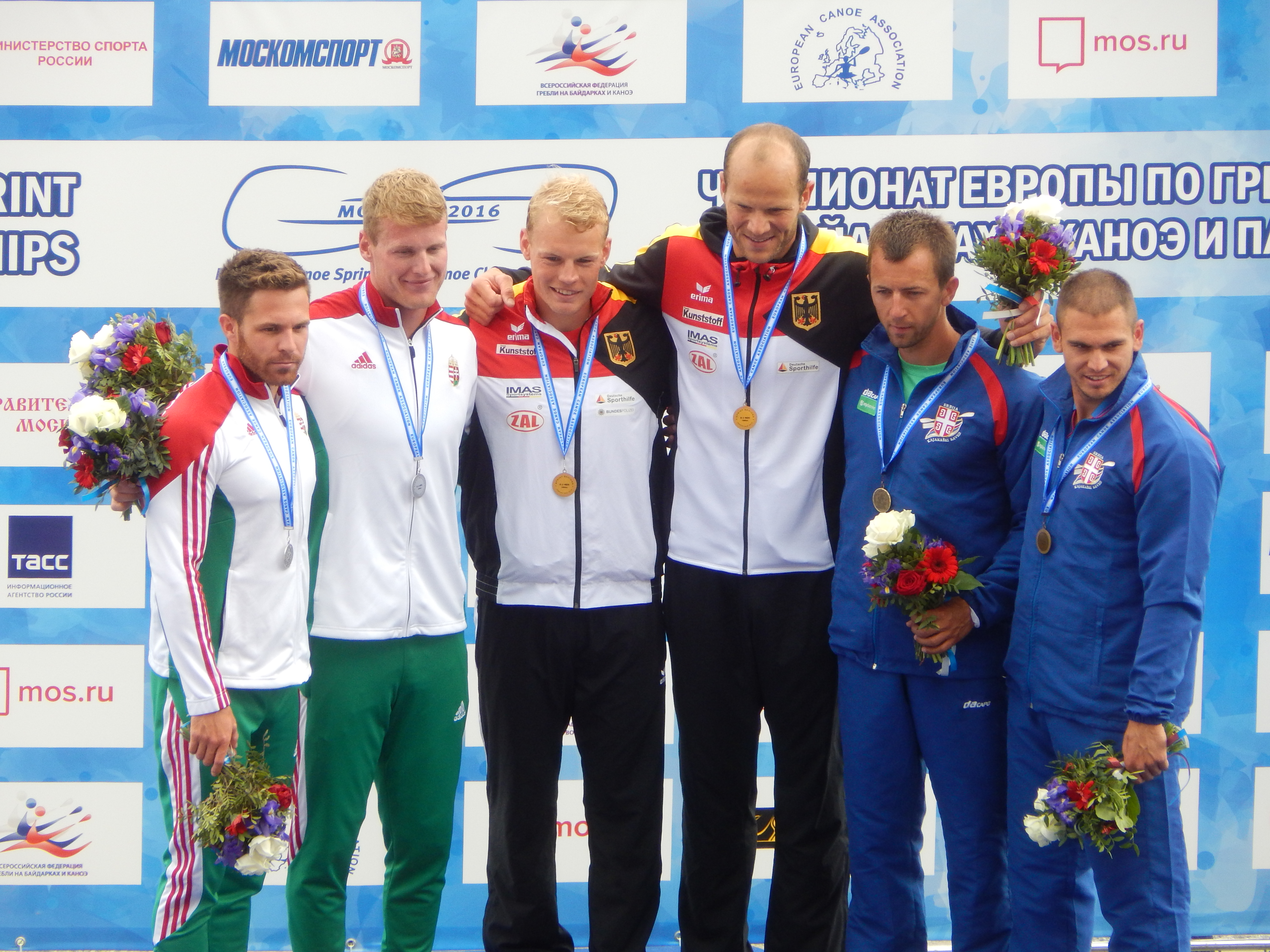 Церемония награждения байдарки-двойки 1000 метров у мужчин